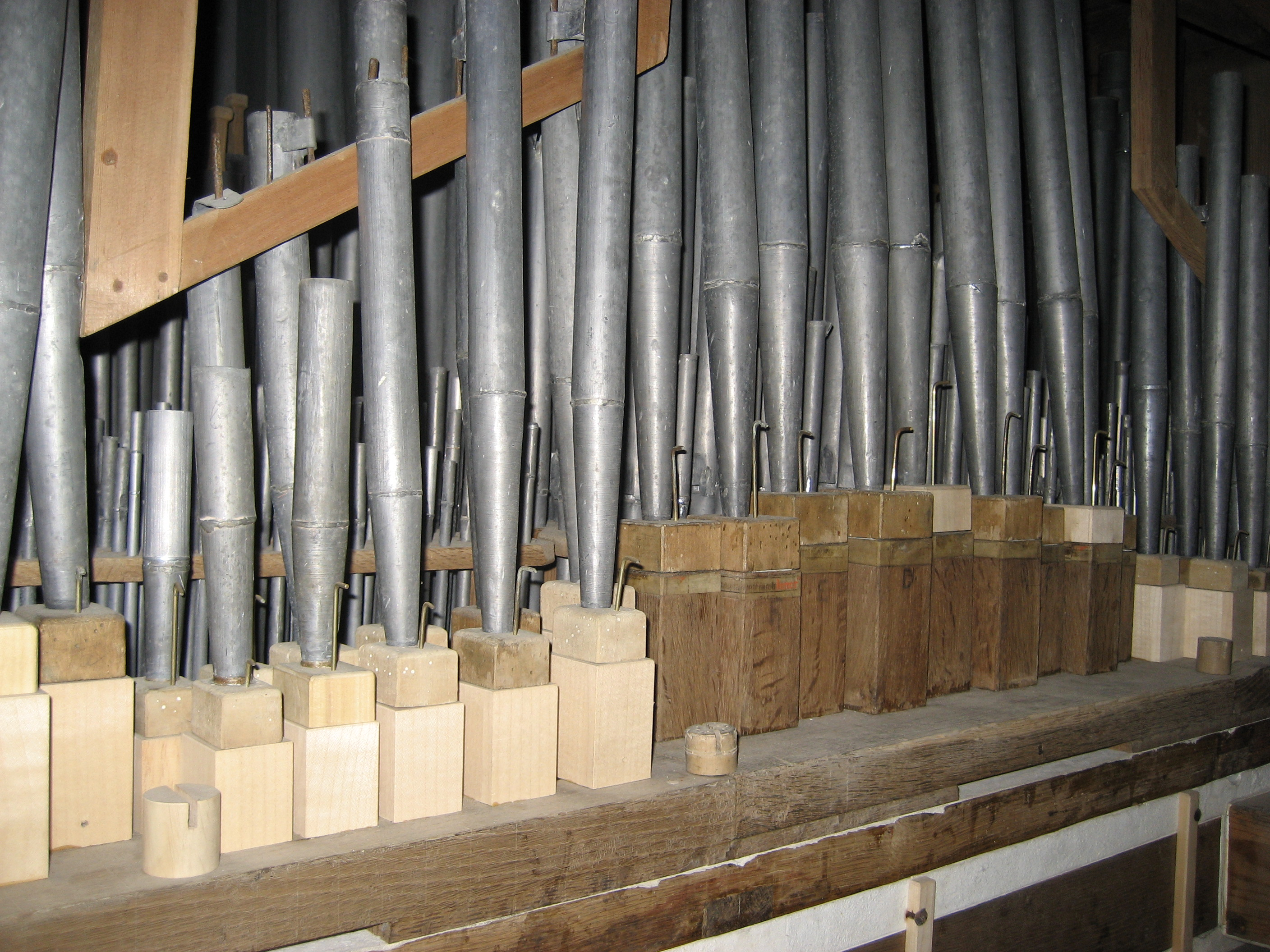 Register Dulcian 8' mit Blick auf die Windlade